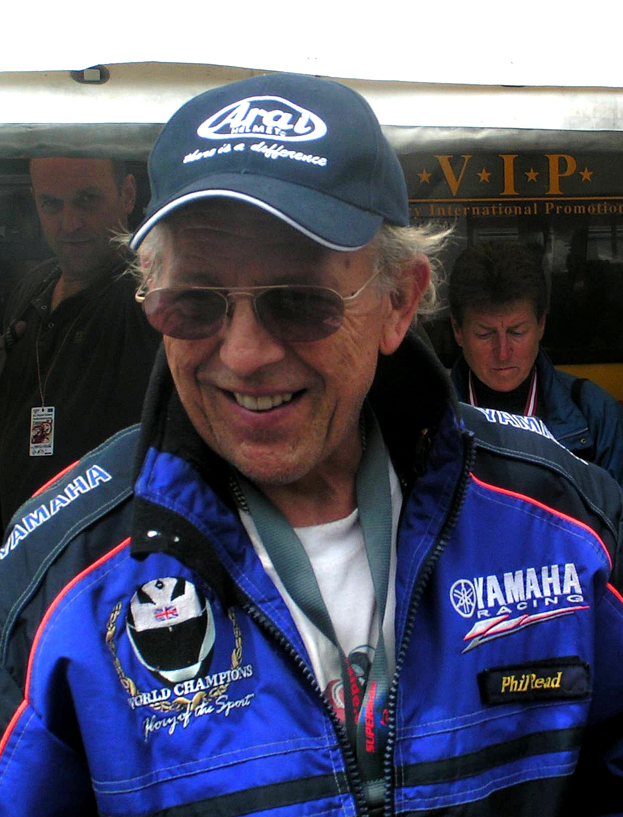 Phil Read am Salzburgring